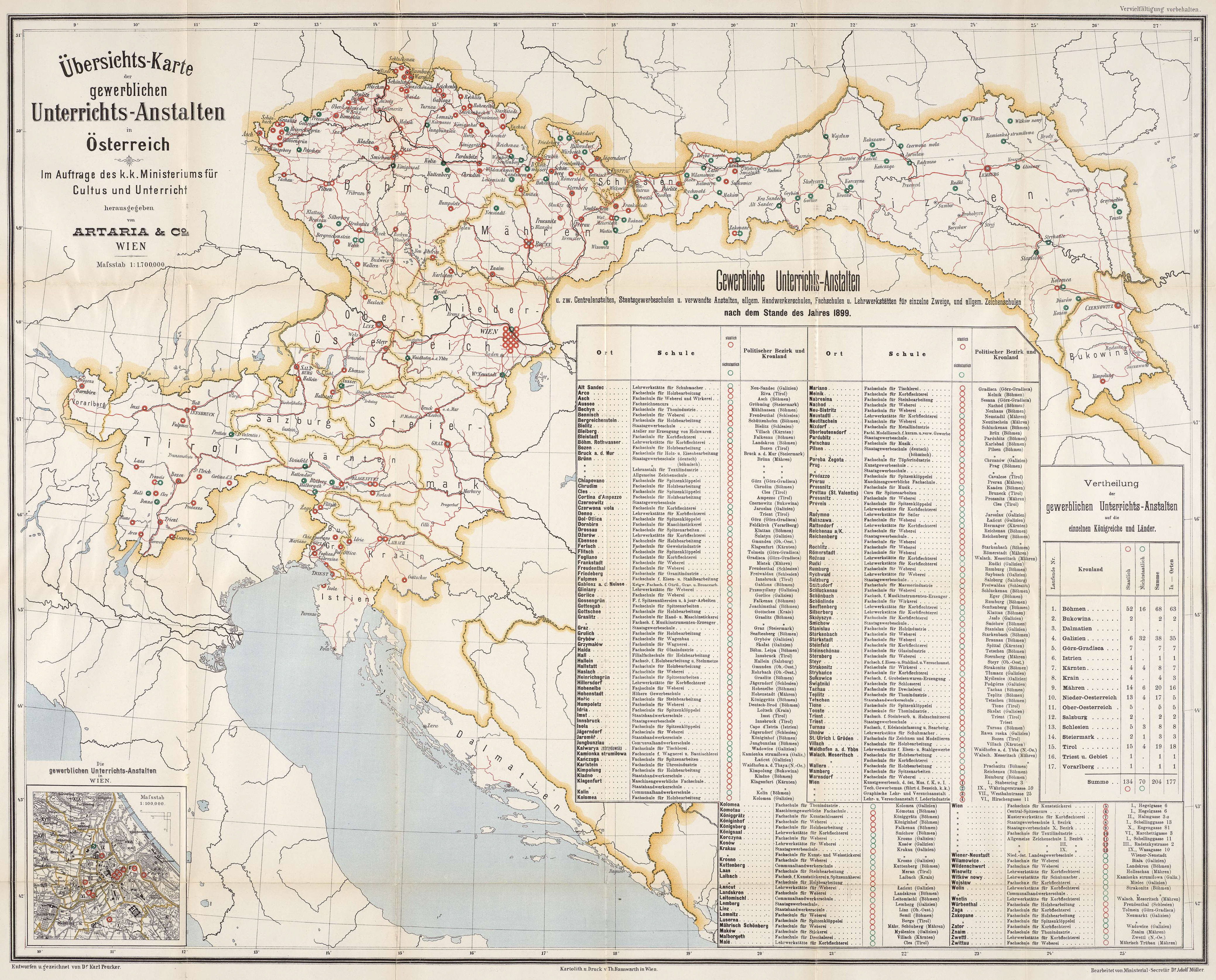 Übersichtskarte der gewerblichen Unterrichts-Anstalten in Österreich / entw. u. gezeichnet von Karl Peucker ; bearb. von Adolf Müller; Maßstab 1: 1.700.000; Artaria, Wien 1899